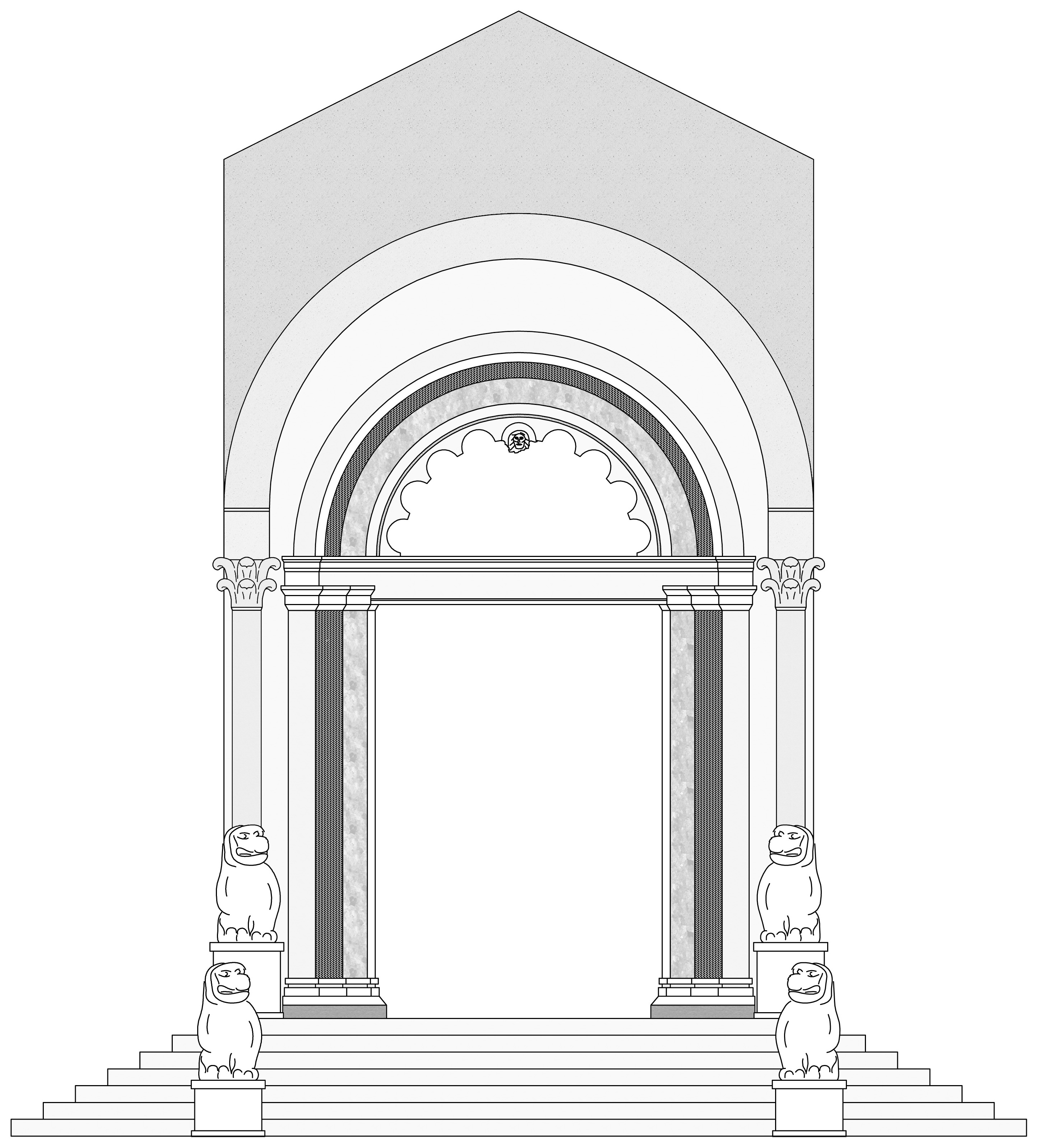 Portale dell'abbazia di Leno (XIII sec). Ricostruzione secondo l'ipotesi di Andrea Breda in Simona Gavinelli, Sopravvivenze lapidee a Leno: l'iscrizione dell'abate Gonterio, Brixia Sacra, 2006, II, p. 359